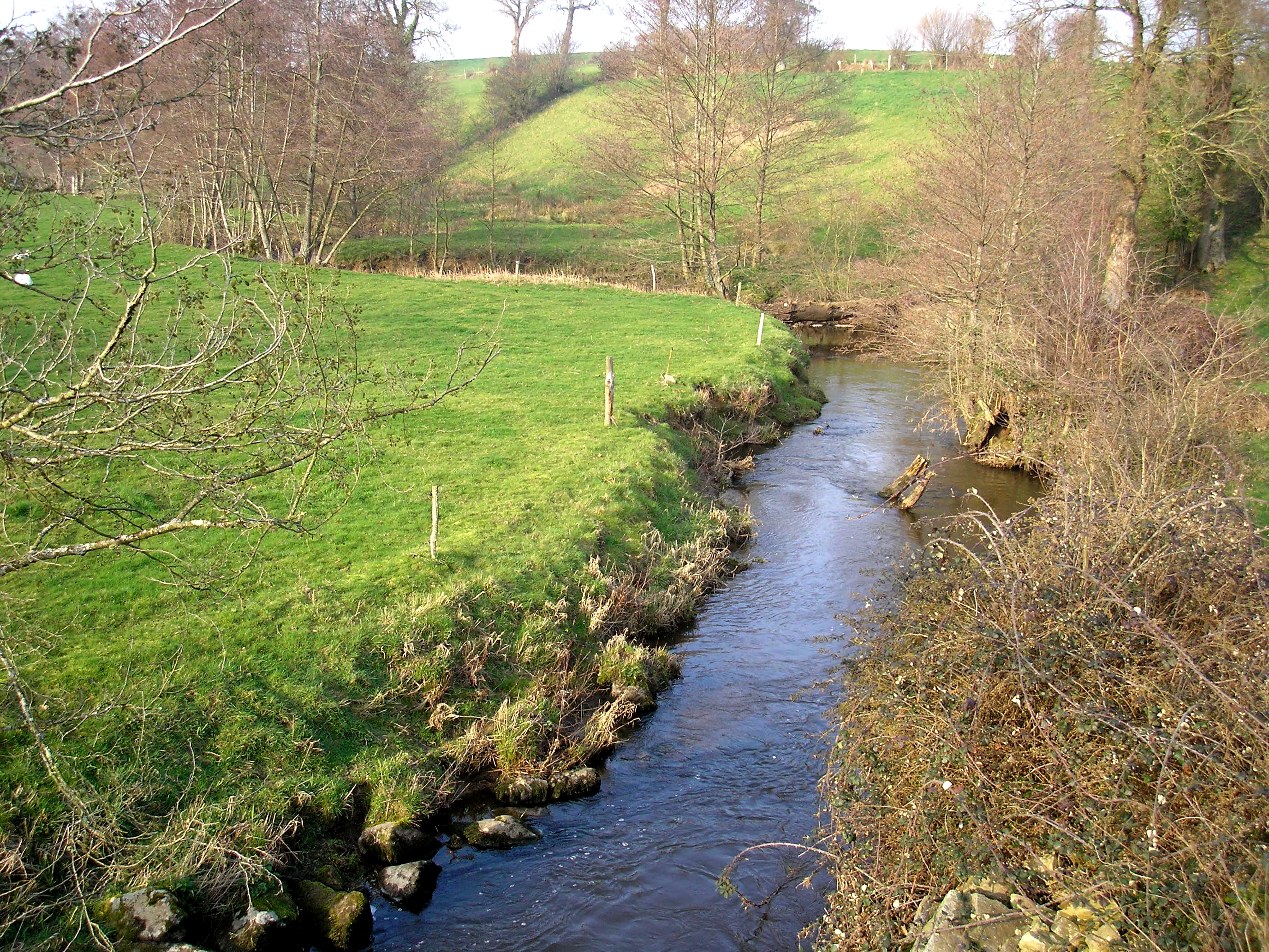 Saint-Germain-de-Tallevende-la-Lande-Vaumont (Normandie, France). La Virène.